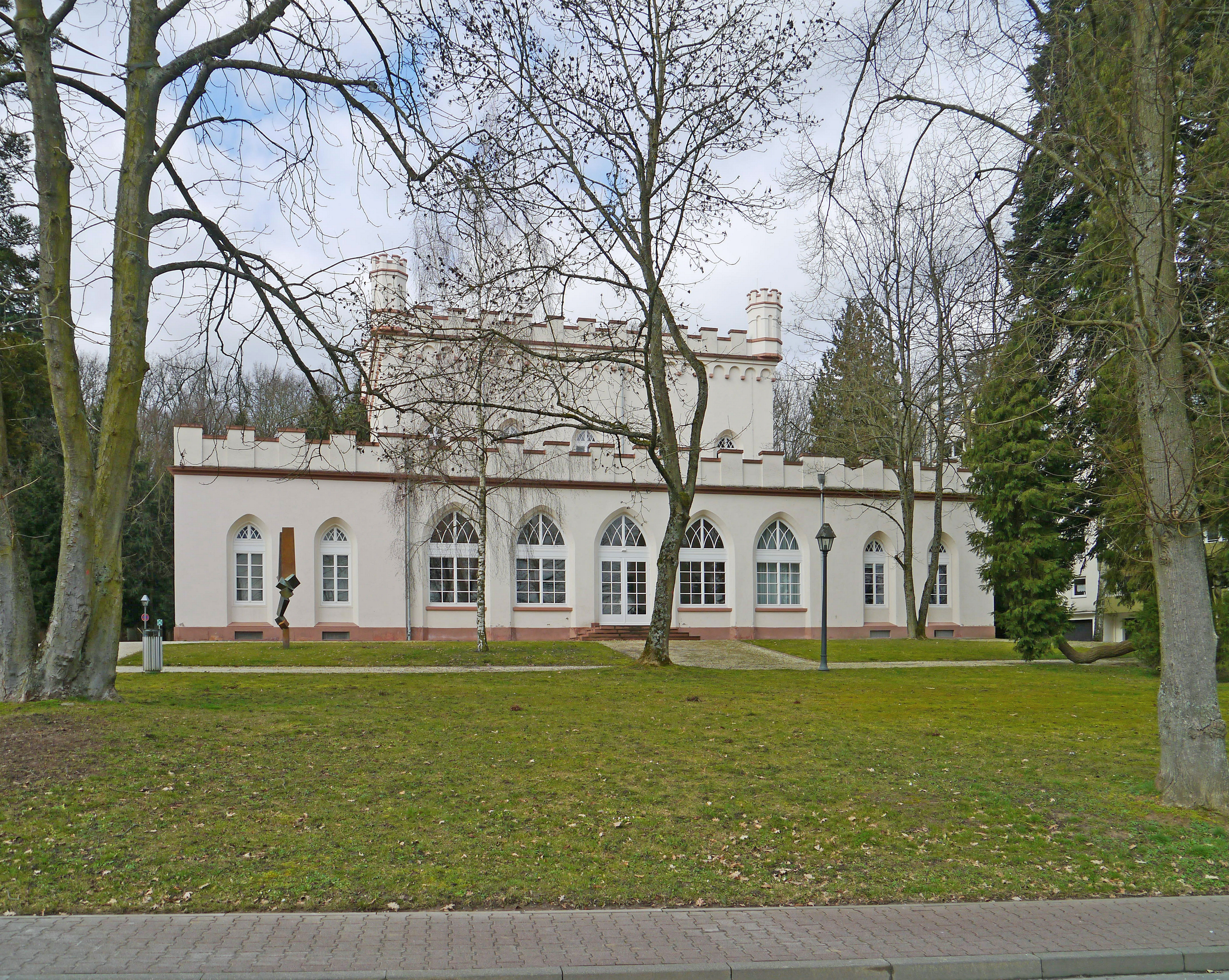 Das Gotische Haus in Bad Homburg